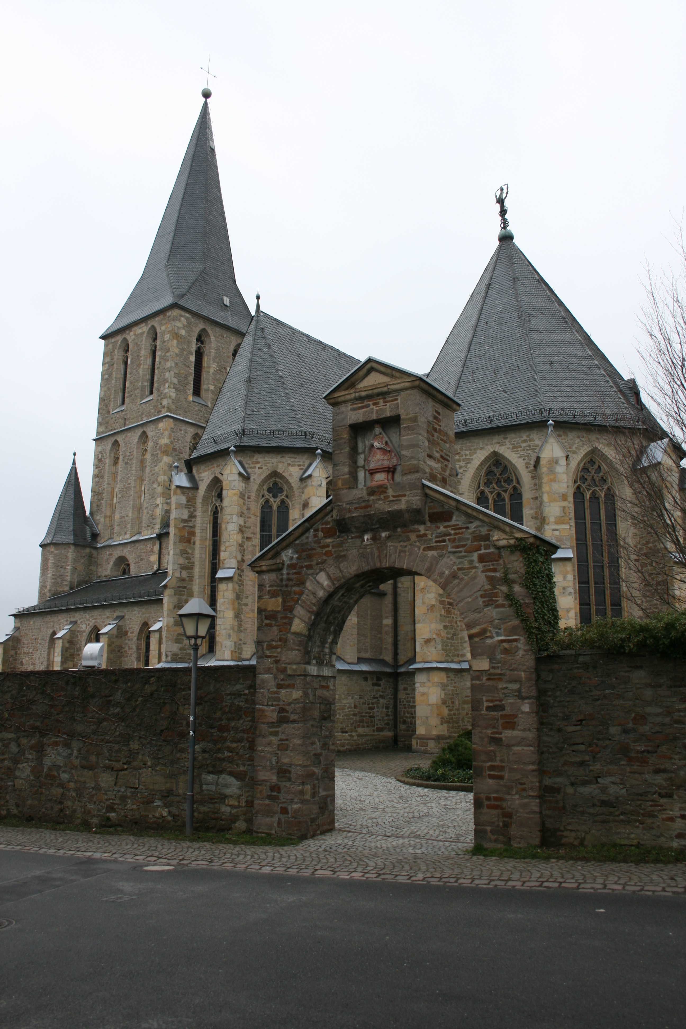 Wallfahrtkirche Hennef-Bödingen